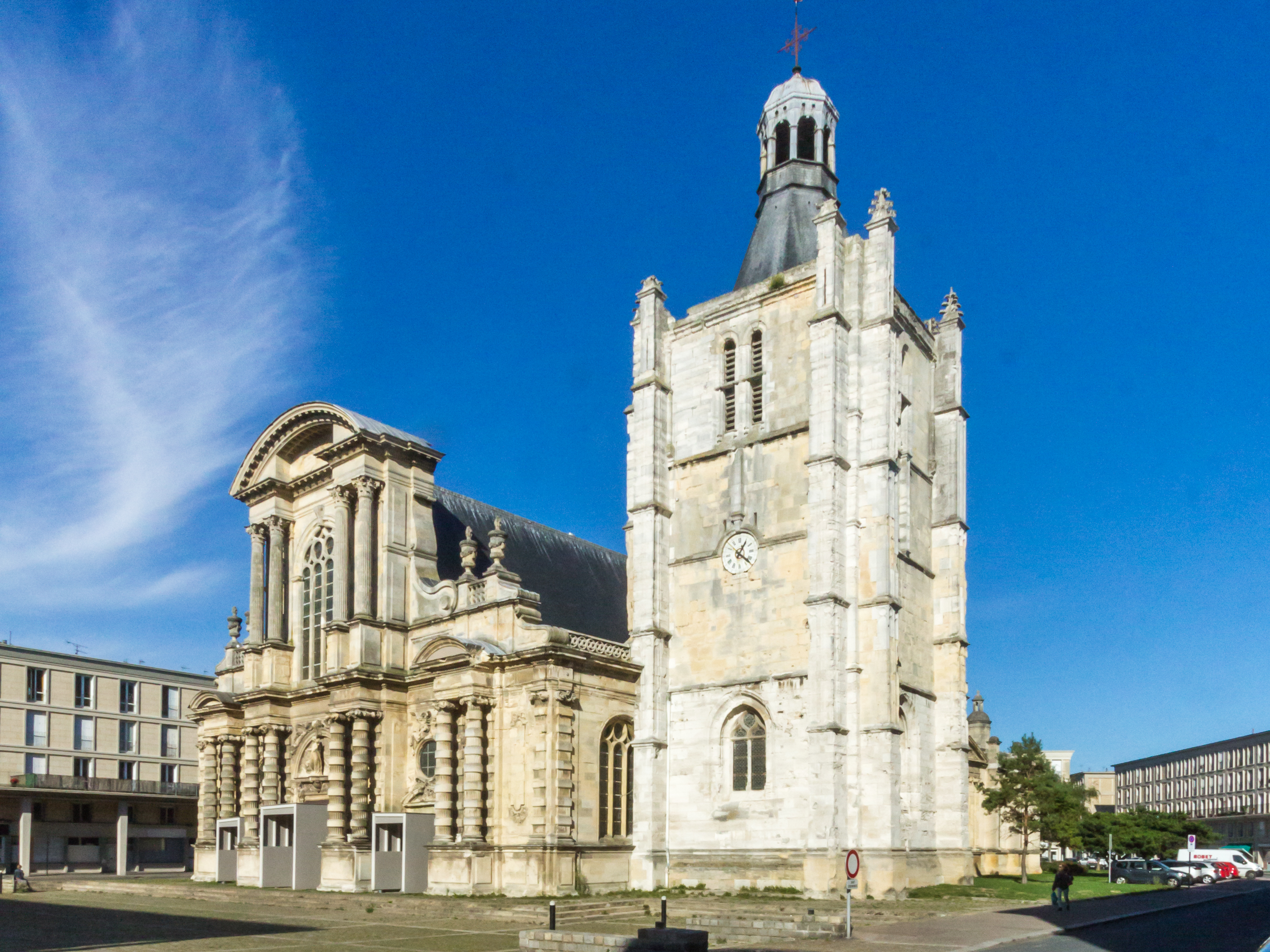 Kathedrale von Le Havre